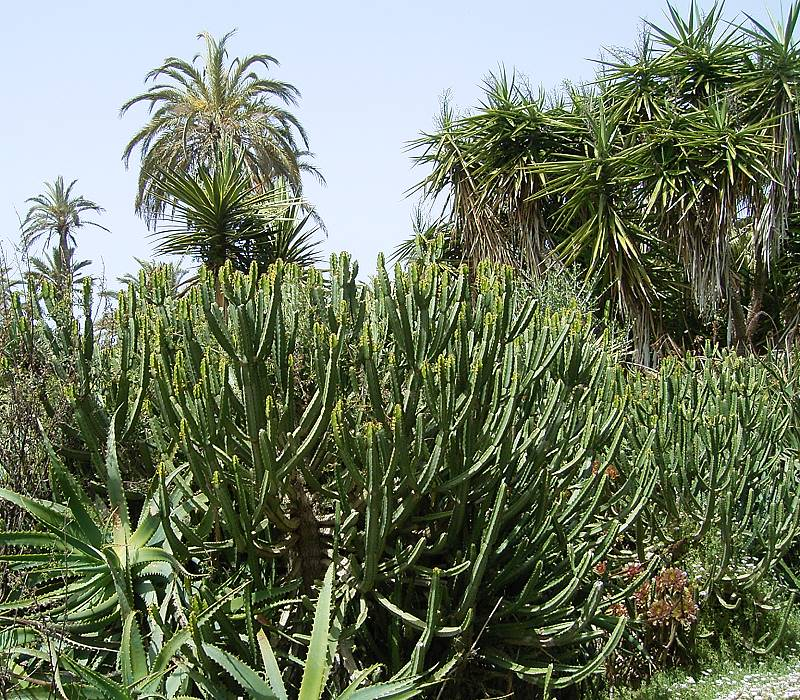 Euphorbia ledienii BG BotaniCactus, Ses Salines, Mallorca, Spain